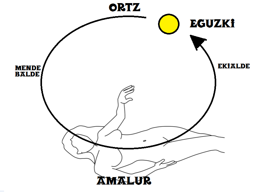 Claude Labat-ren arabera Amalur irakusten duen ilustrazioa.